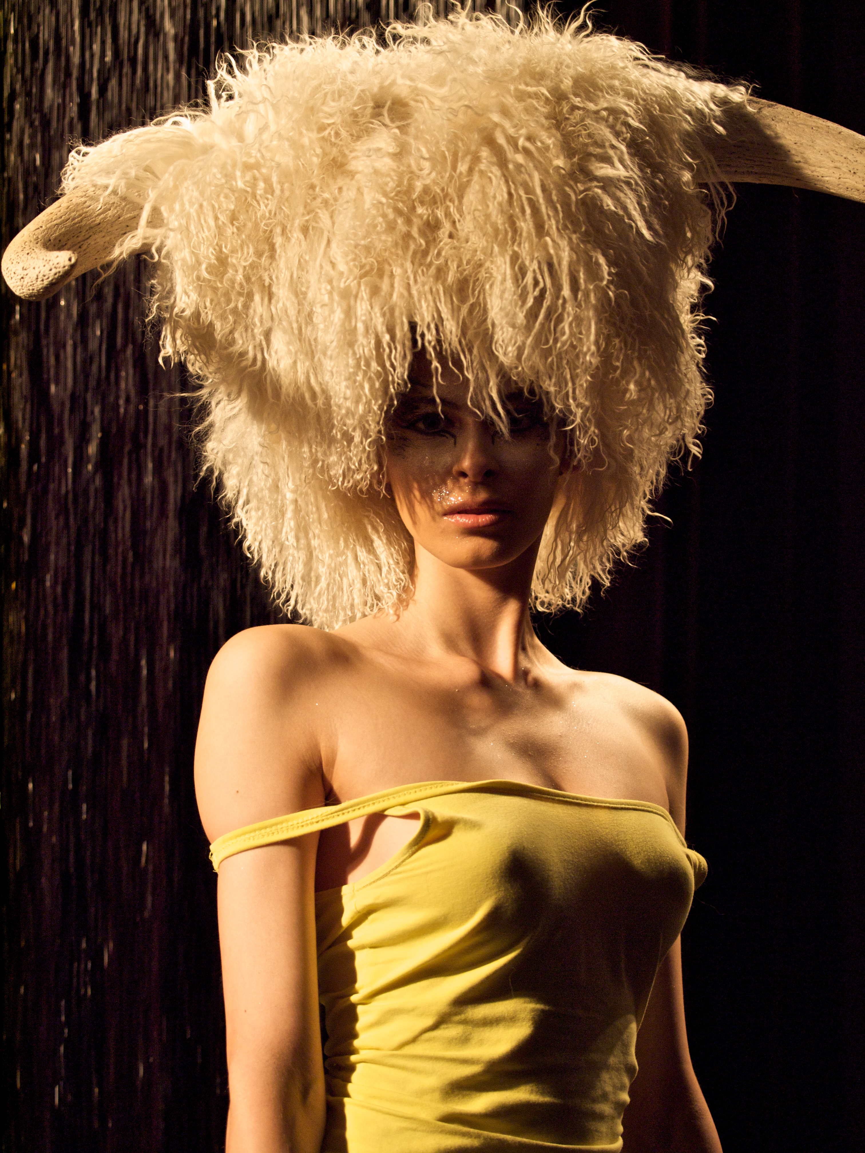 Haute Couture Autumn/Winter 2010-2011